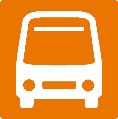 Icono del Complementario